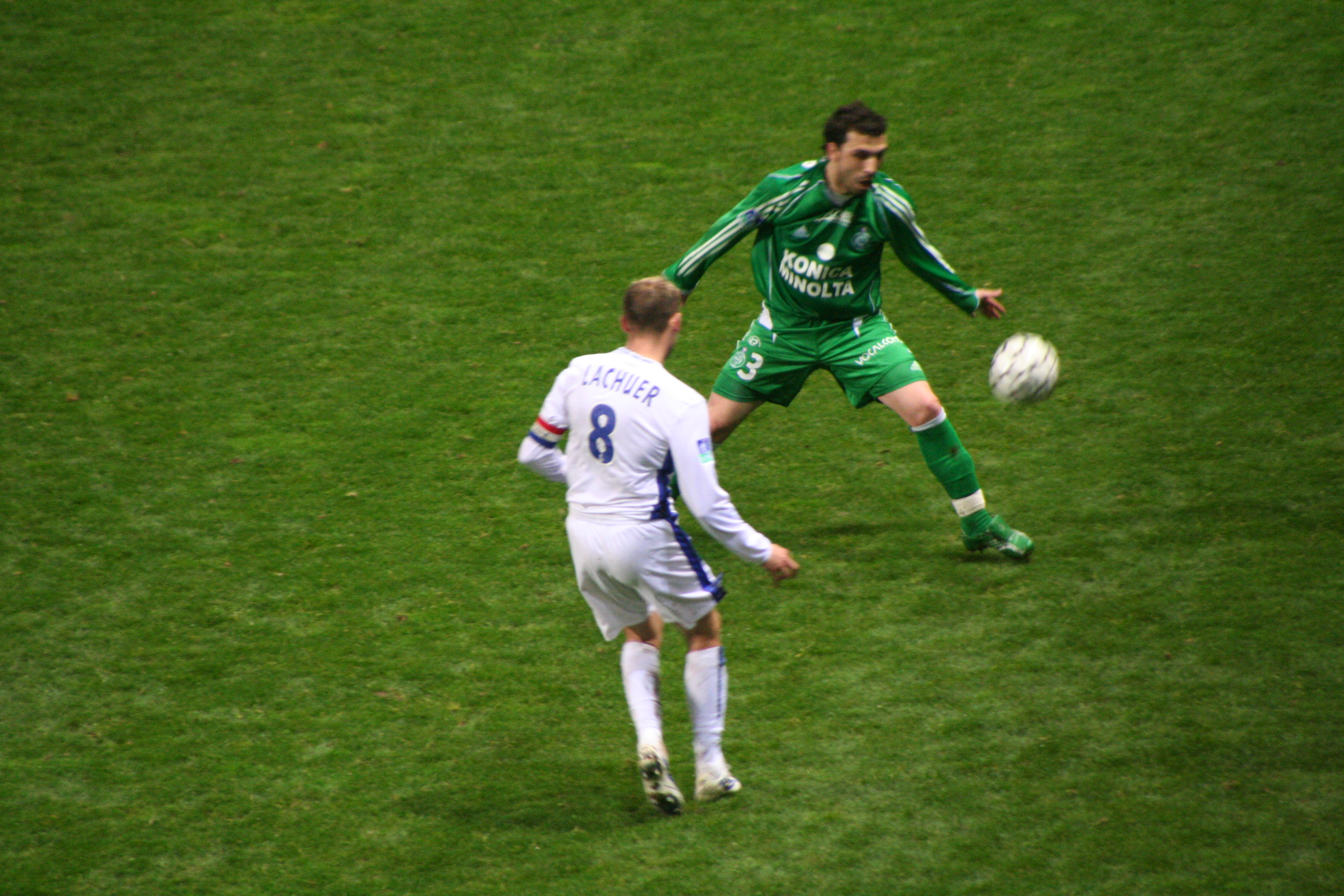 AJ Auxerre-Association sportive de Saint-Étienne Loire 2005-2006